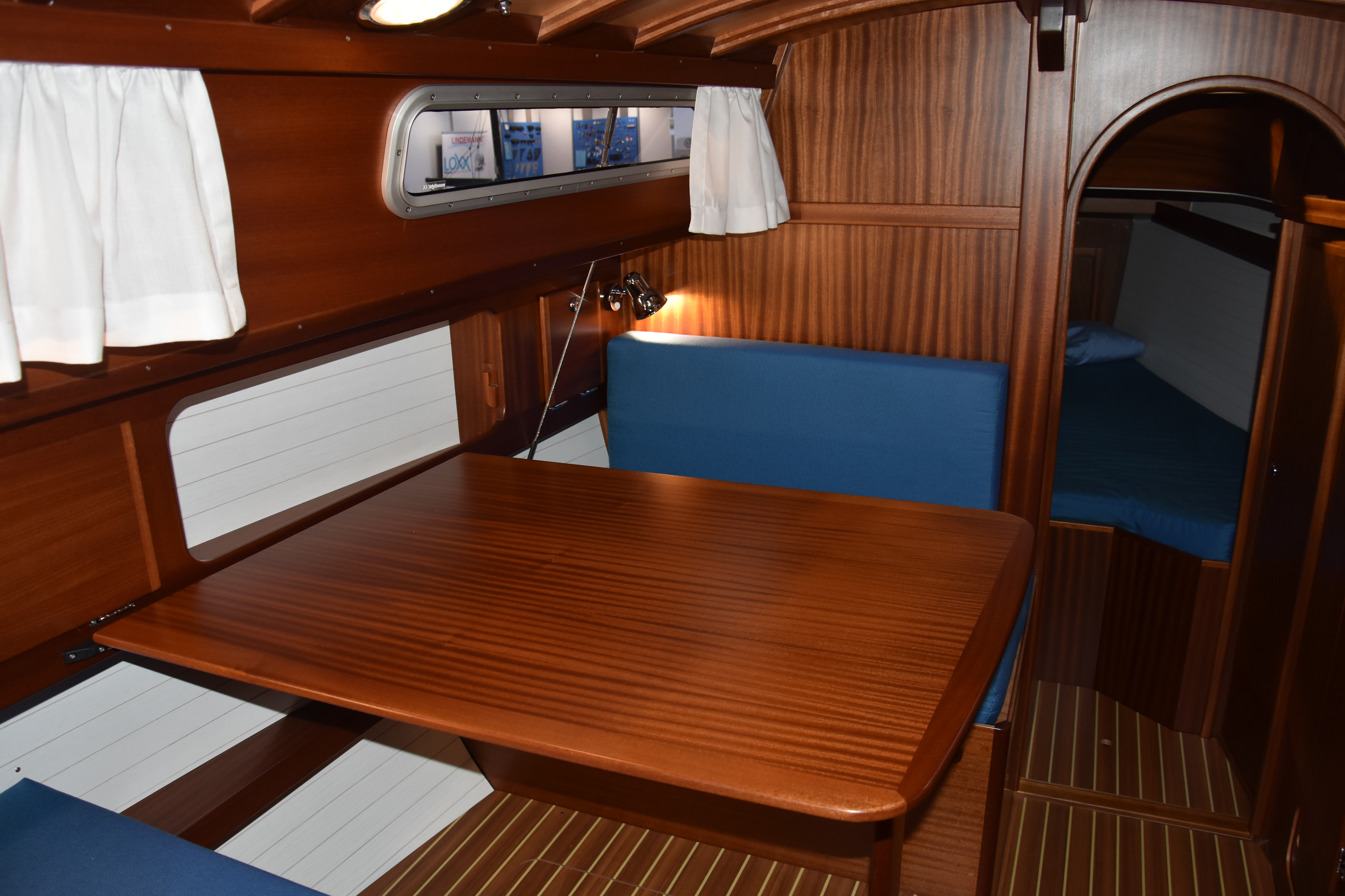 Saloon mit seitlichem Tisch auf einer kleinen Segelyacht (Biga 27)